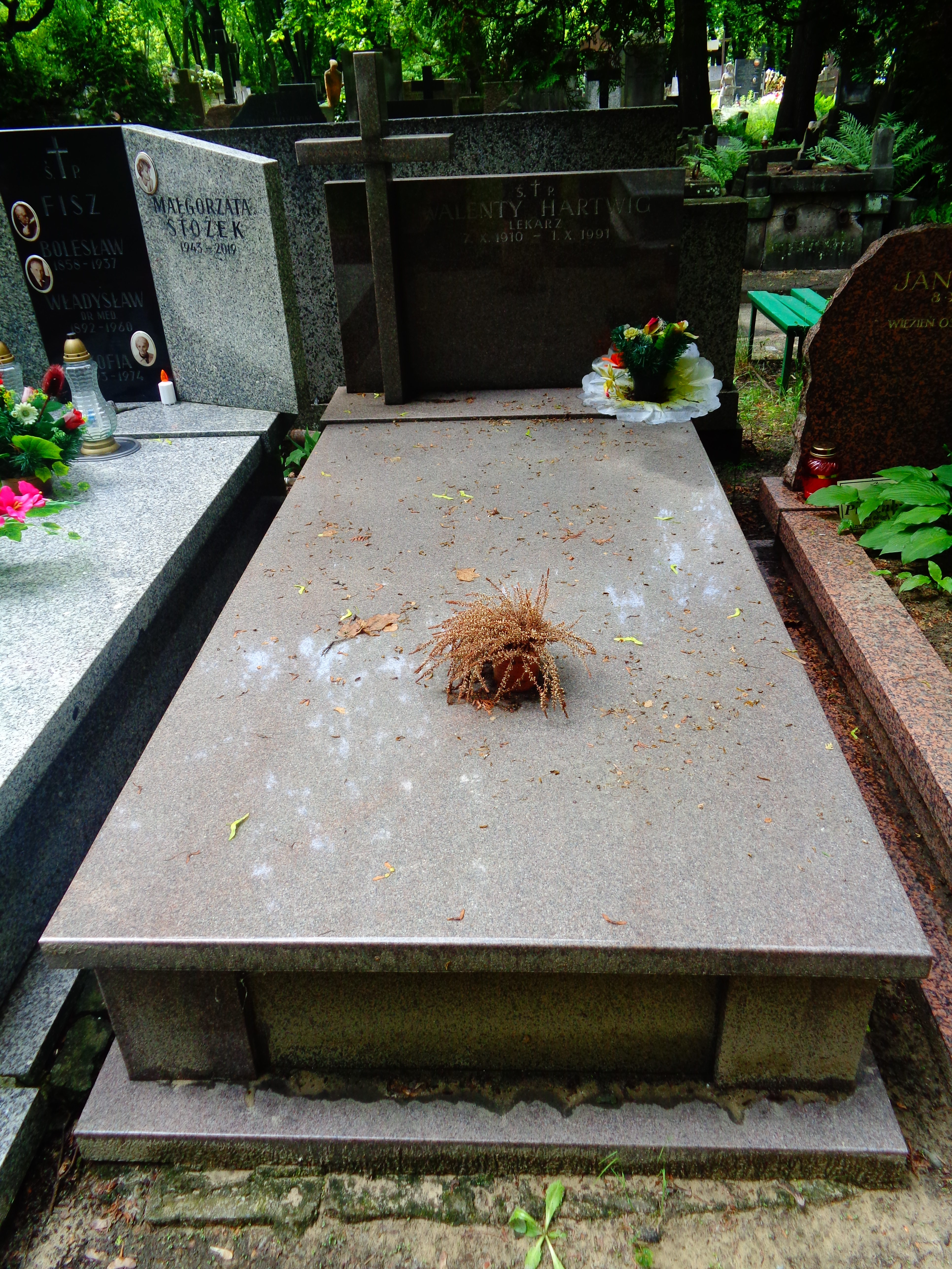 Grób Walentego Hartwiga na Cmentarzu Powązkowskim